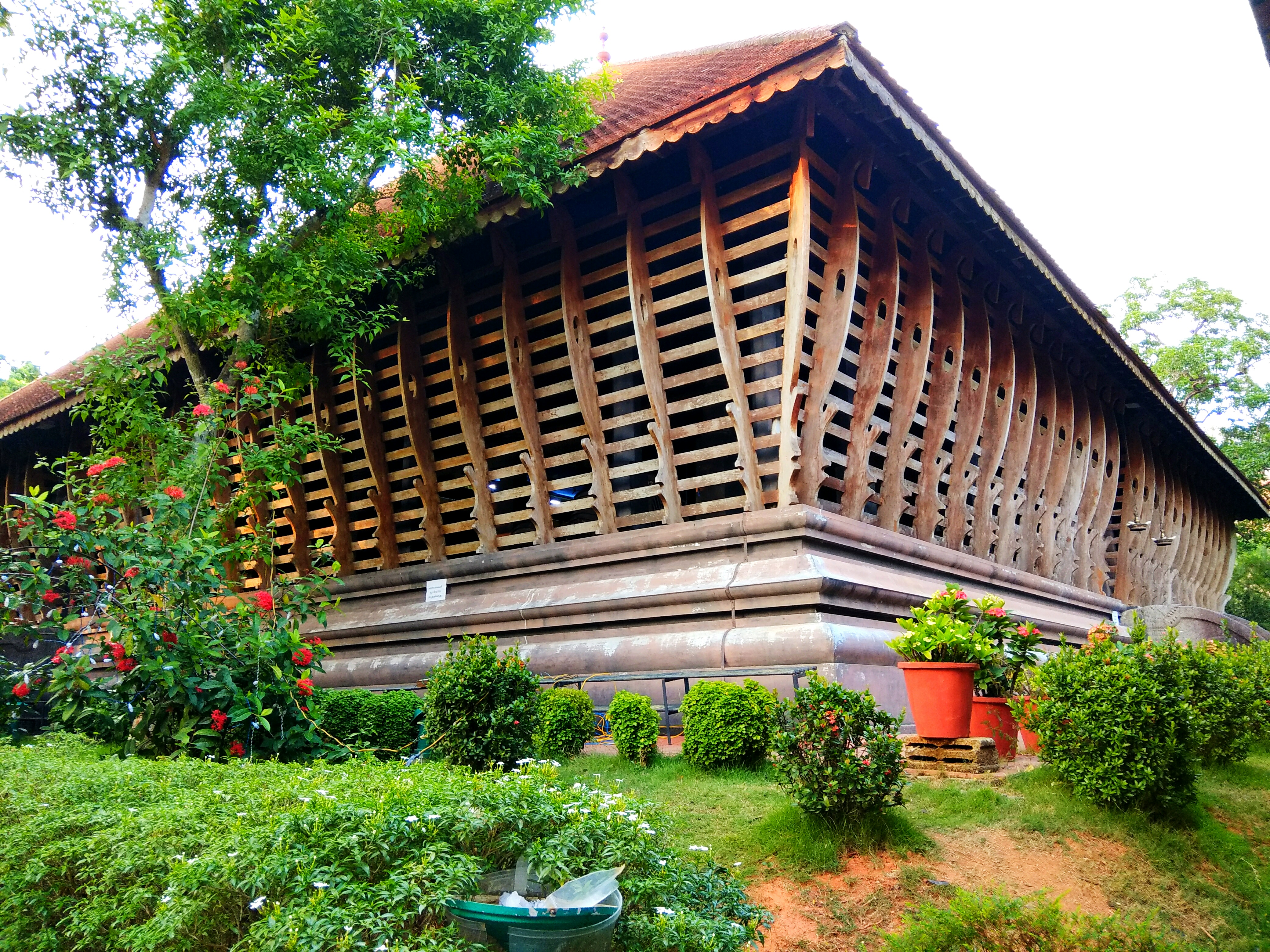 വൈലോപ്പിള്ളി സംസ്കൃതി ഭവൻ, നളന്ദ, തിരുവനന്തപുരം